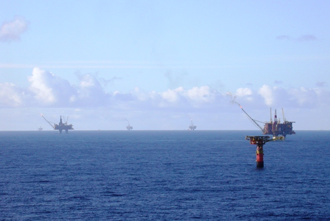 Statfjord B and Statfjord A